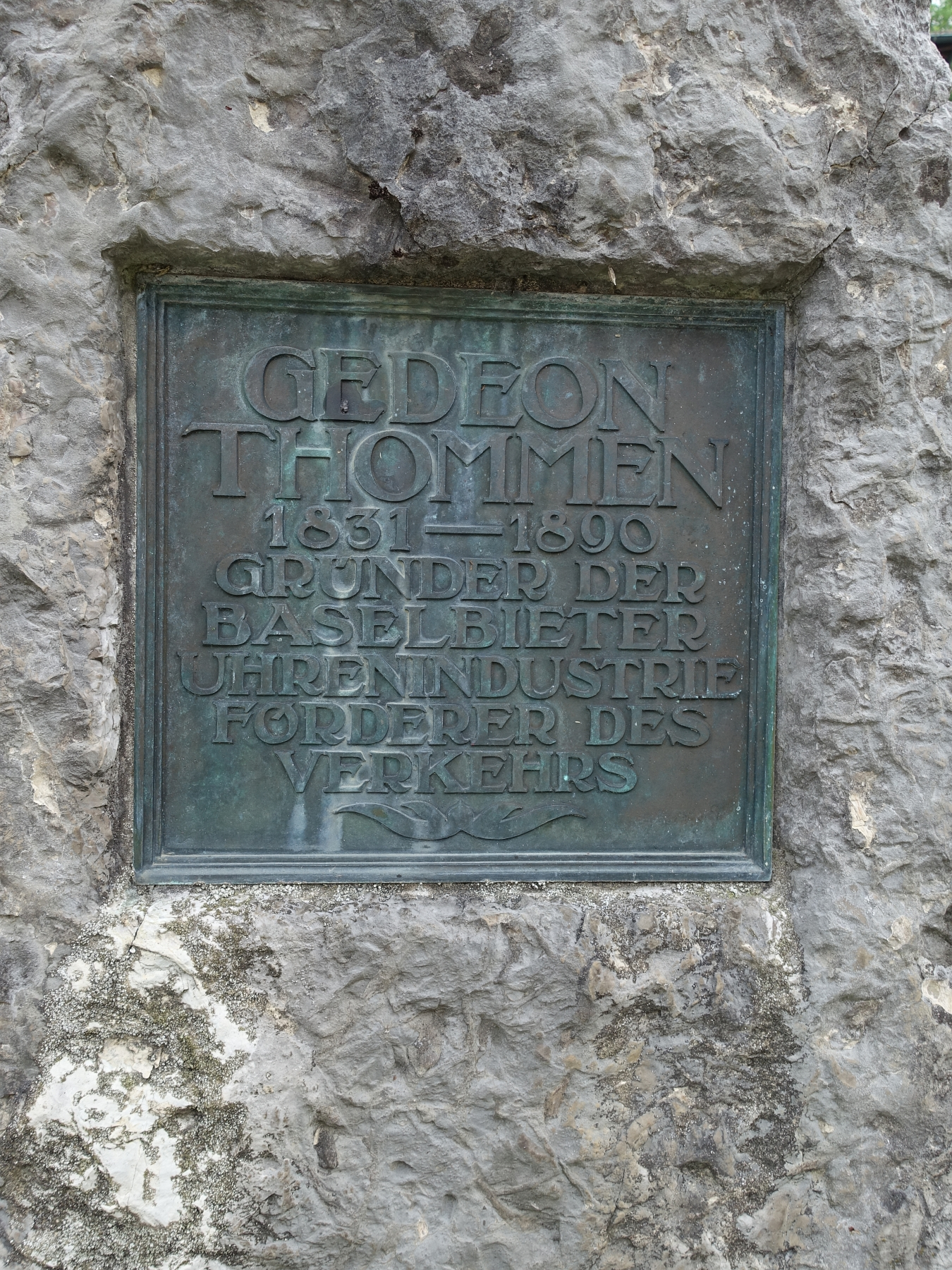 Gedenkstein für Gédéon Thommen (1831–1880) Unternehmer und Politiker in Waldenburg